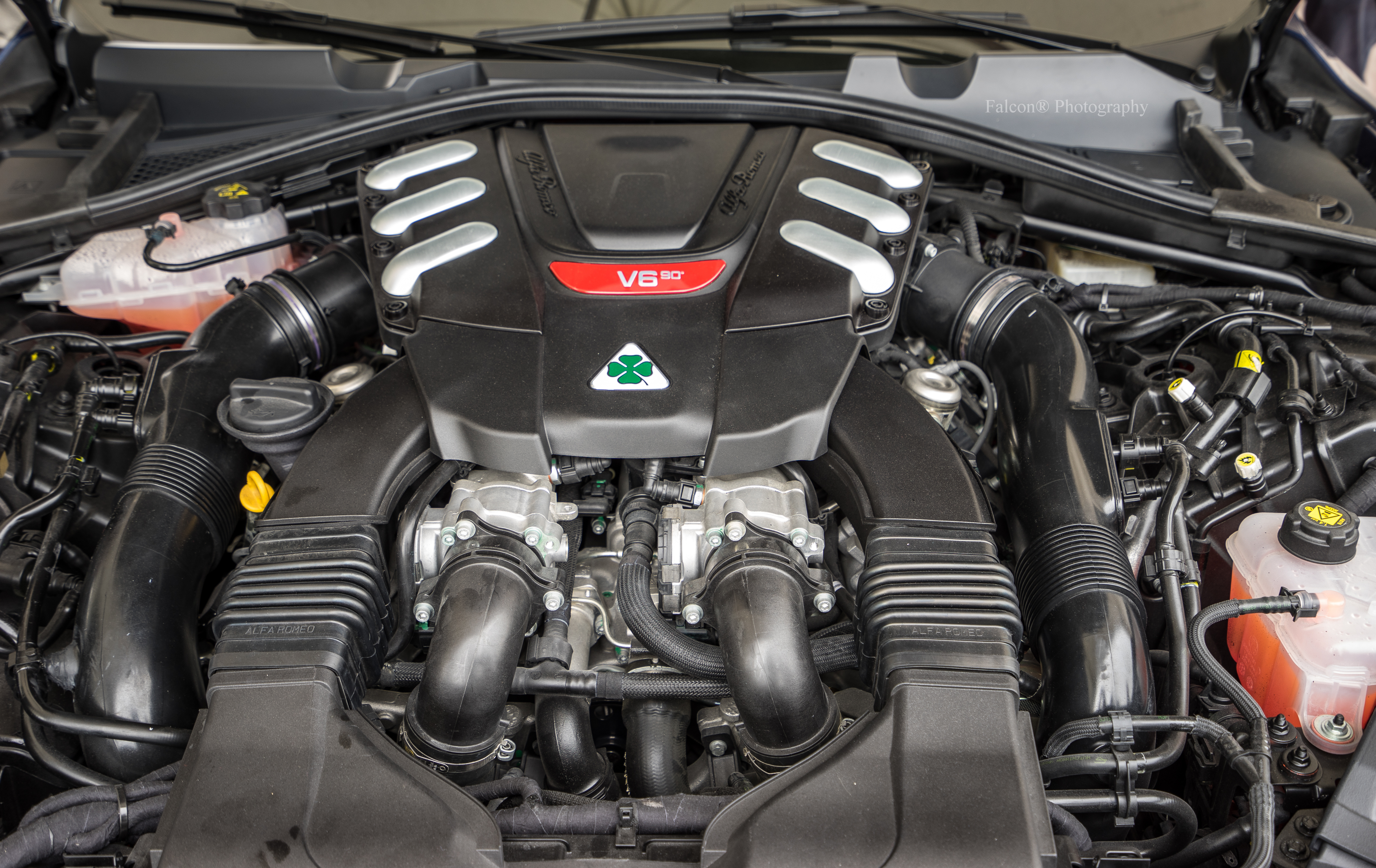 Alfa Romeo Giulia QV 2016 V6 3.0 bi-turbo 510cv 600N.m 1374kg 0-100 3,9sec, 307km/h, 79 000€